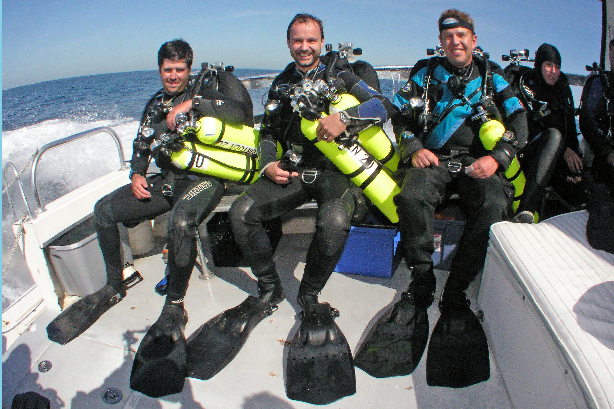 DIR divers.